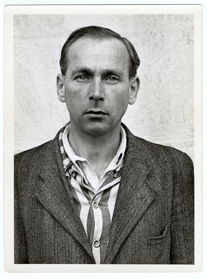 Emil Erwin Mahl (* 9. November 1900; † 1. April 1967 in Heidelberg) war als Funktionshäftling Kapo im Krematorium des KZ Dachau. Im Dachau-Hauptprozess wurde Mahl zum Tode verurteilt, das Urteil wurde jedoch später reduziert.